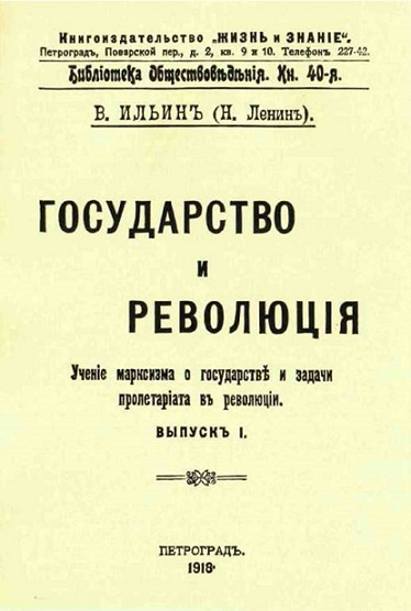 Stato e rivoluzione, 2^ edizione, Petrograd, 1919